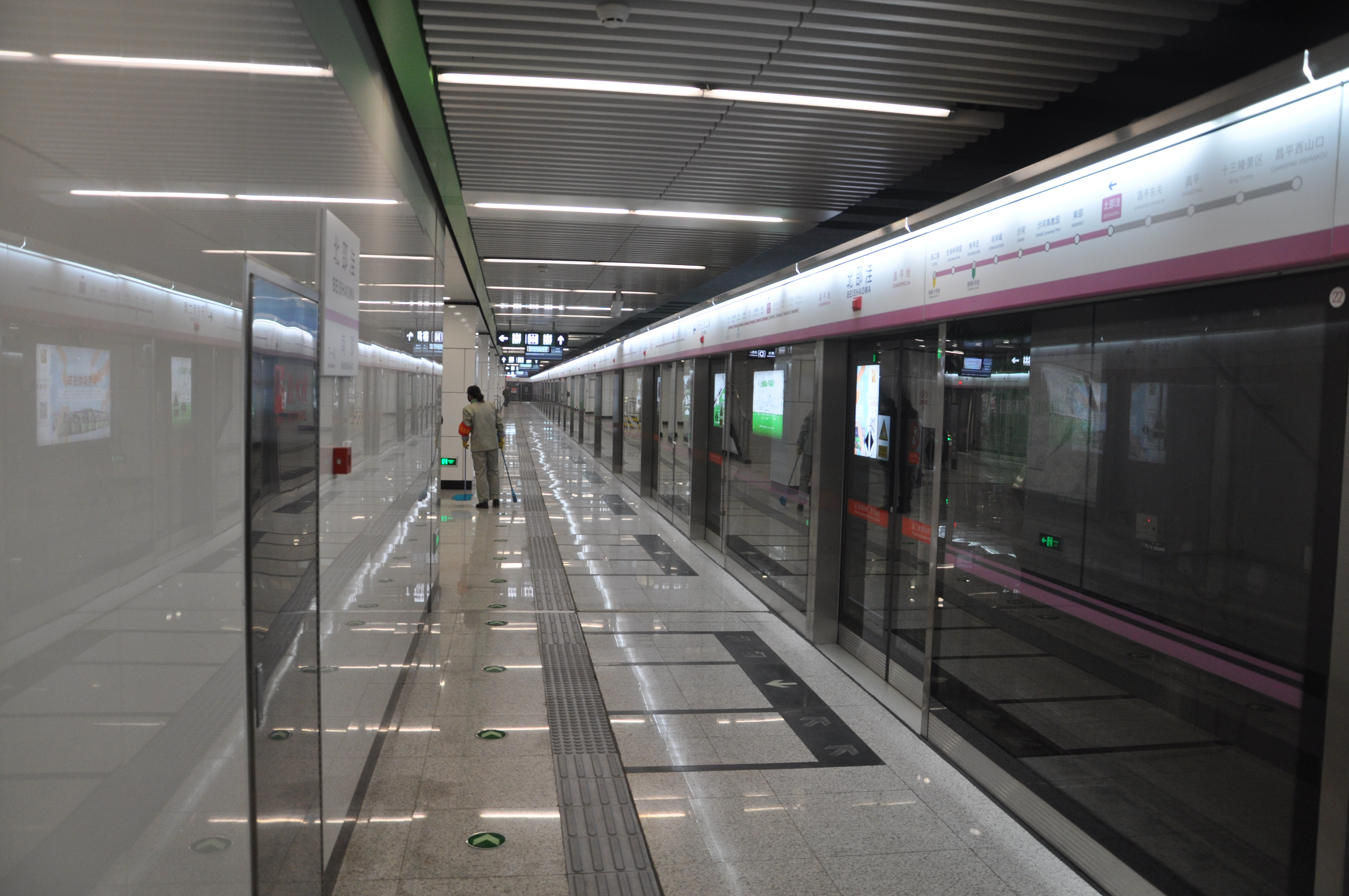 北京地铁昌平线北邵洼站站台。